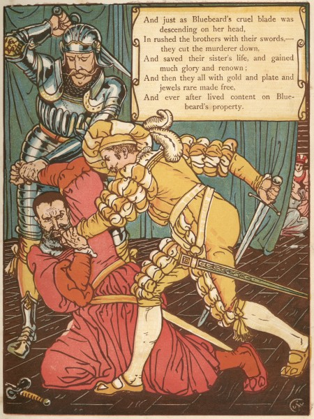 Гравюры по рисункам Крейна к сказкам «Синяя Борода», «Спящая Красавица», «Красная Шапочка», «Джек и бобовый стебель»